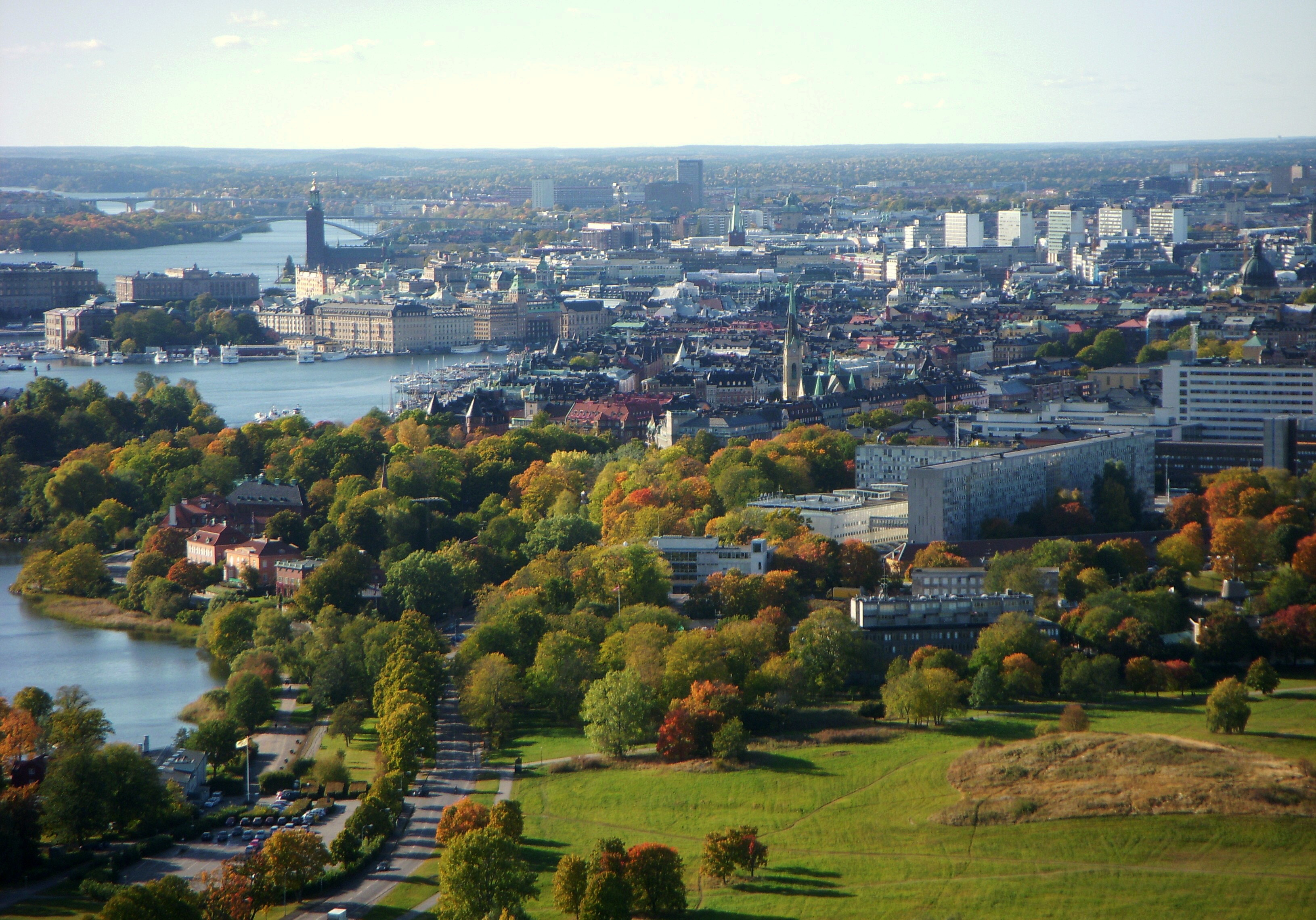 Stockholm från Kaknästornet